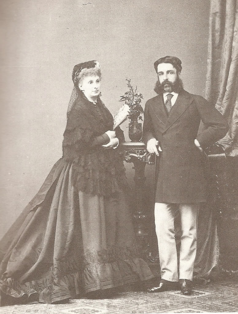 Posado de los duques de Sesto, José Osorio y Silva y Sofía Troubetzkoy